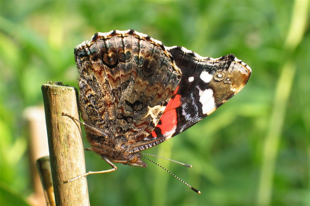 Admiral (Vanessa atalanta)